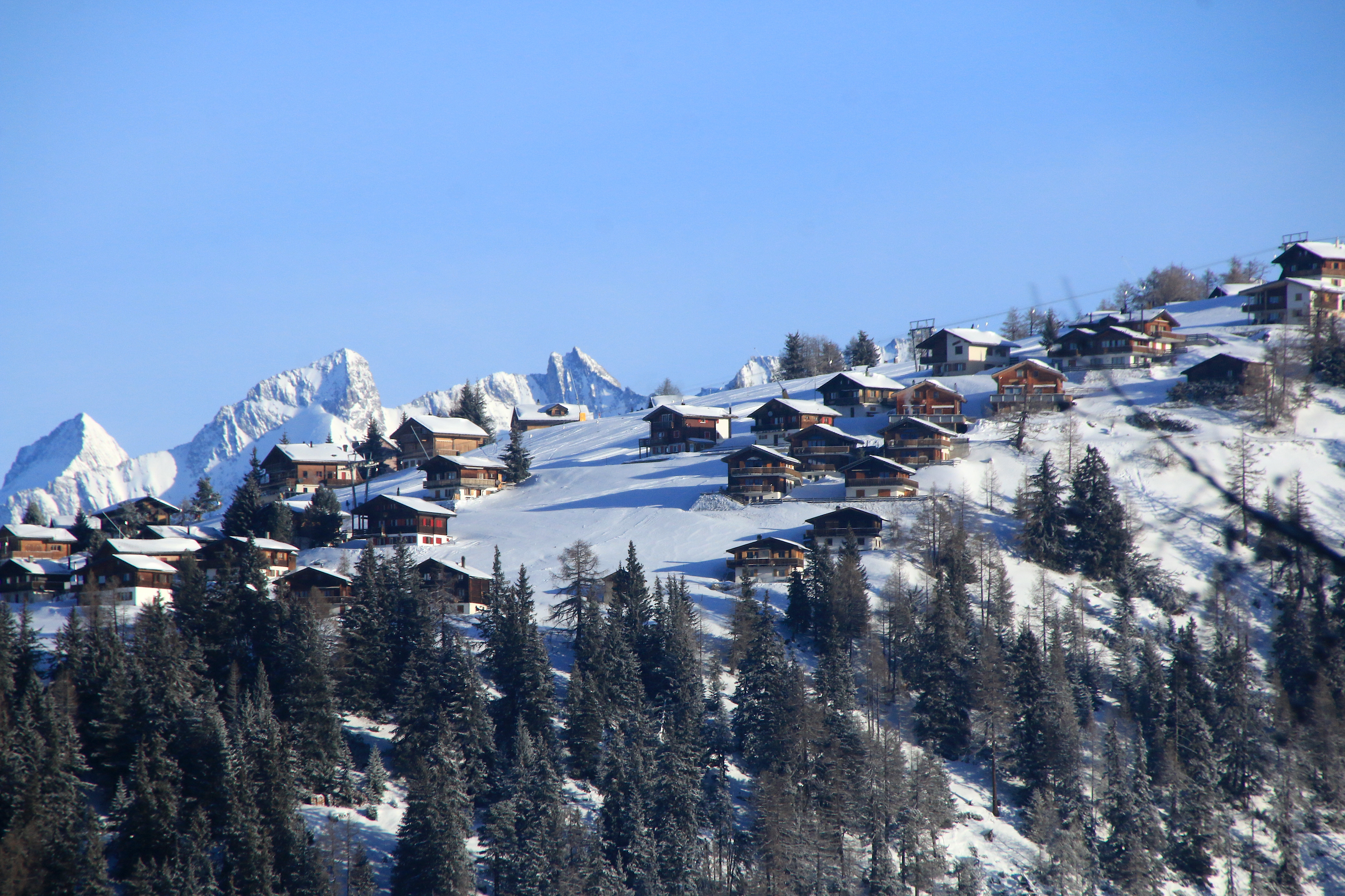 Rosswald (2019)